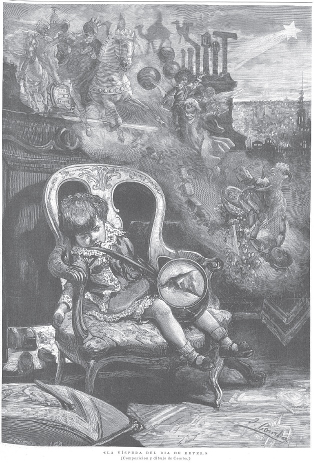 Víspera de Reyes